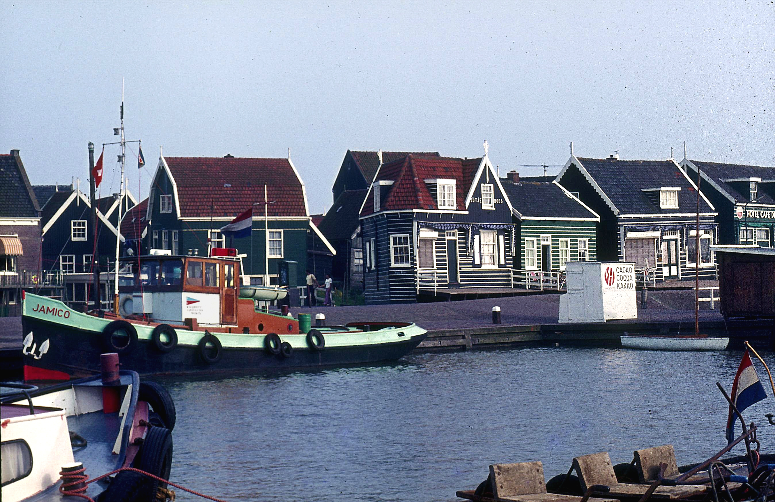 Hafen von Marken, Niederlande